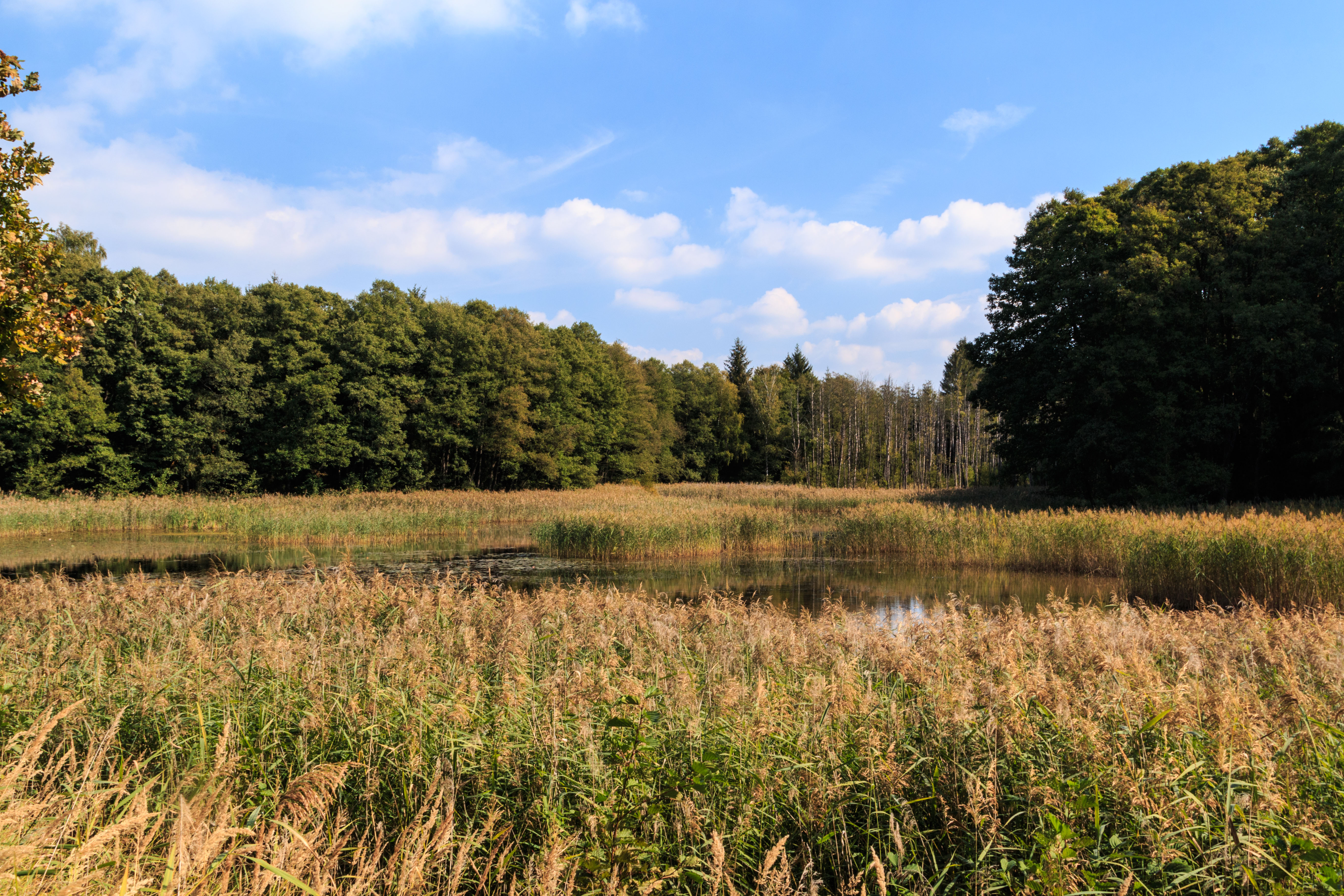 Strážovský rybník u Hradčan Project: Vodstvo.